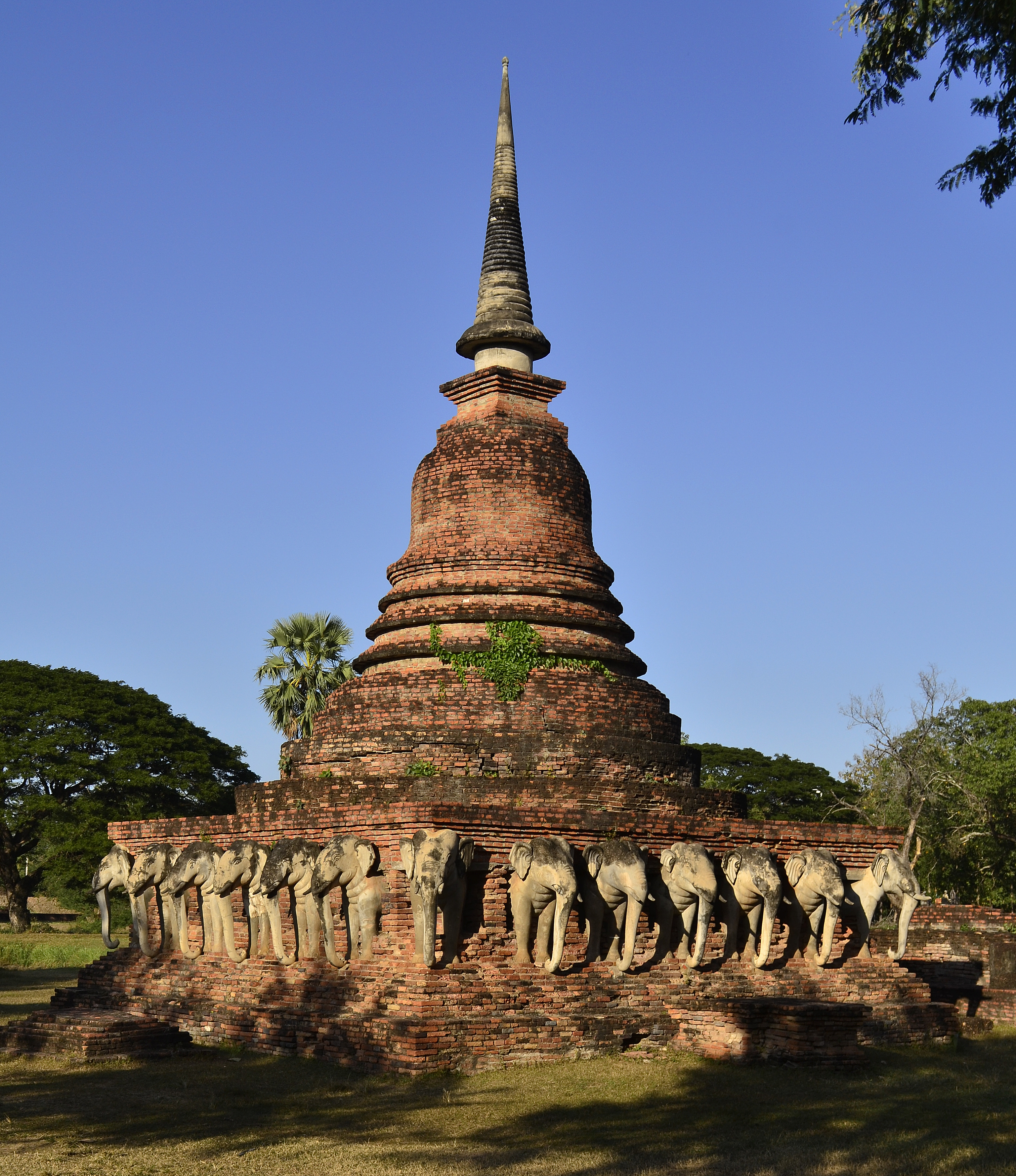 Wat Sorasan im Geschichtspark Sukhothai